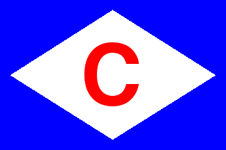 Cobelfret Houseflagge